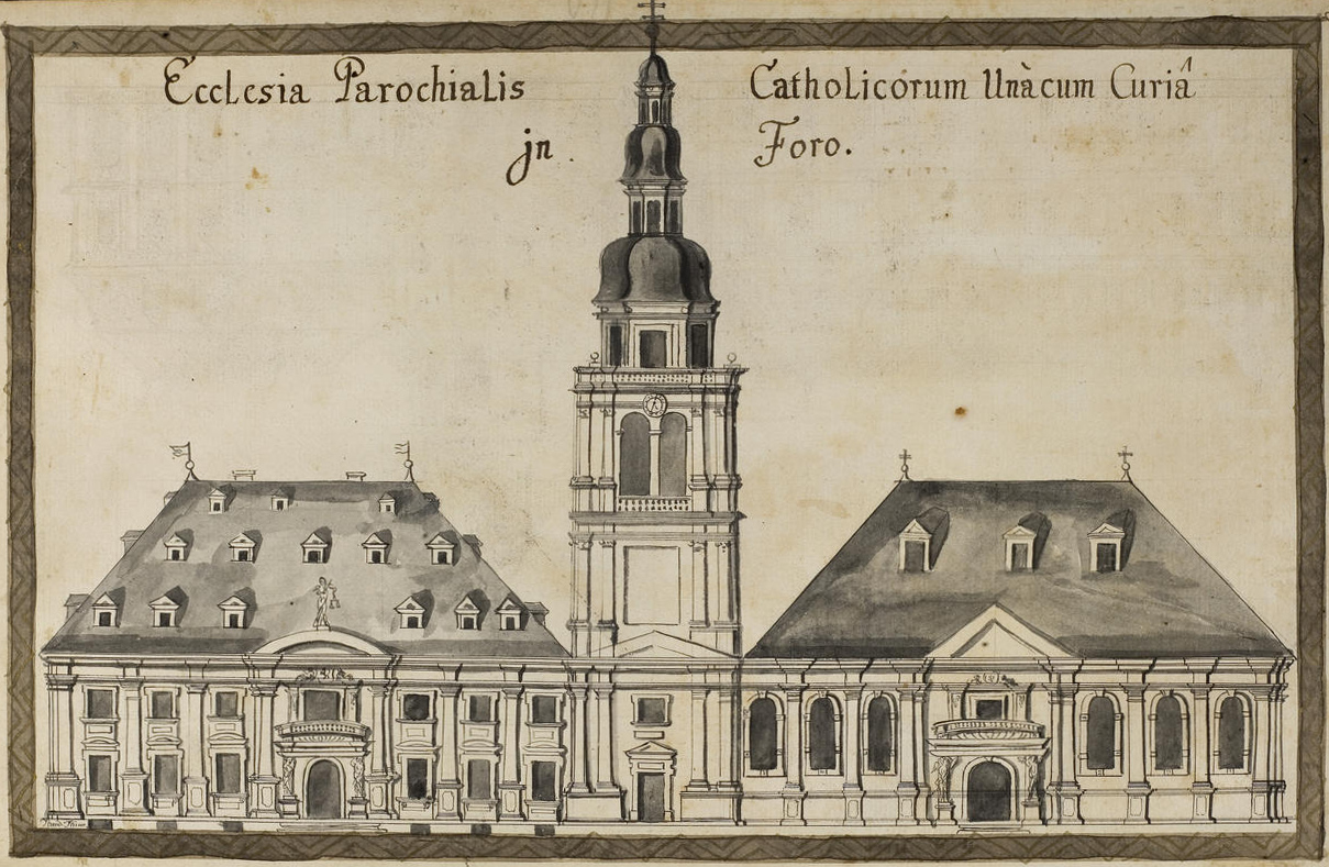 Altes Rathaus und St.-Sebastian-Kirche in Mannheim.